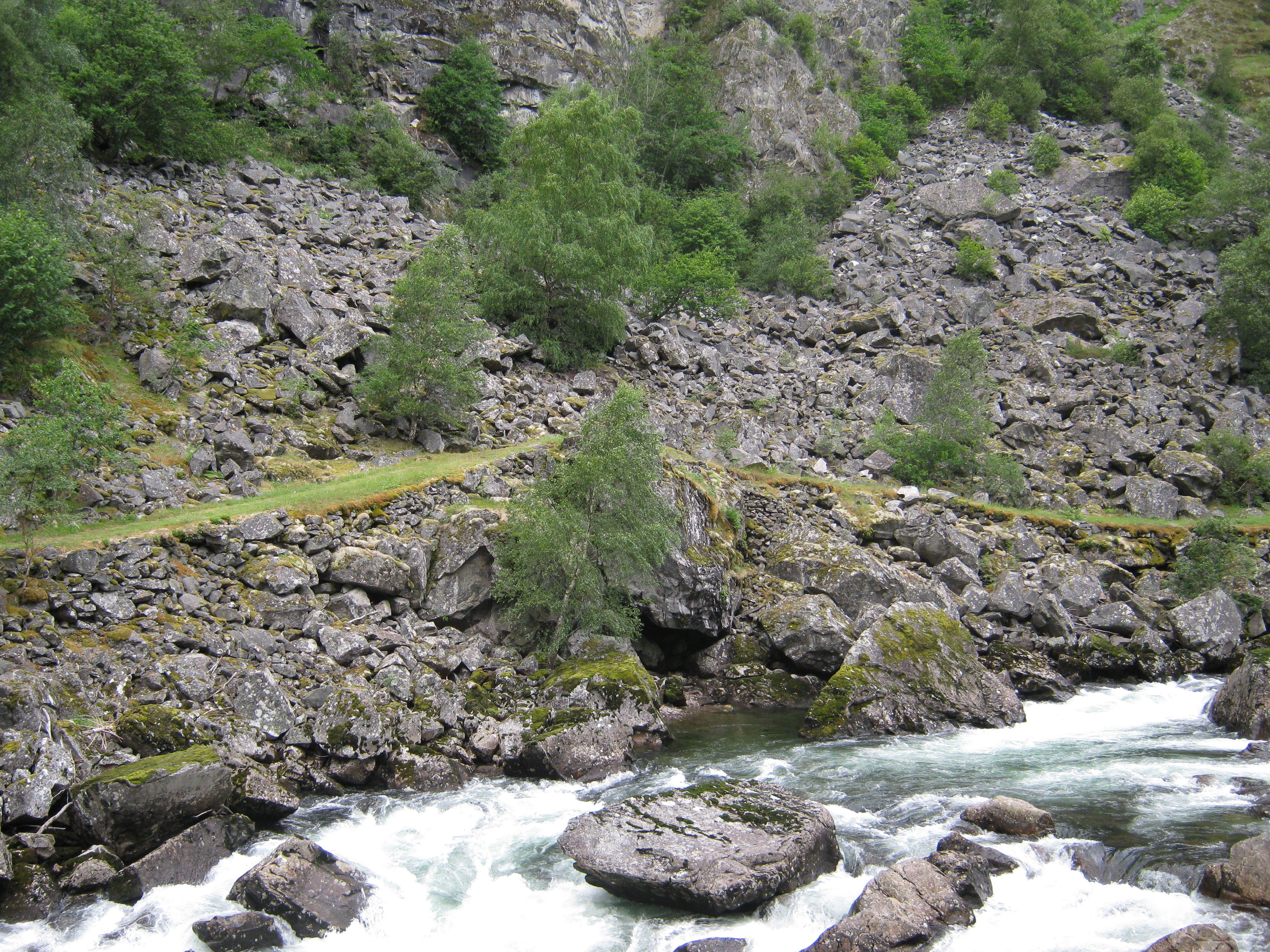 Den bergenske kongevei ved Borgund i Lærdal.